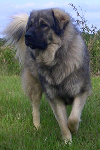 A Sarplaninac.